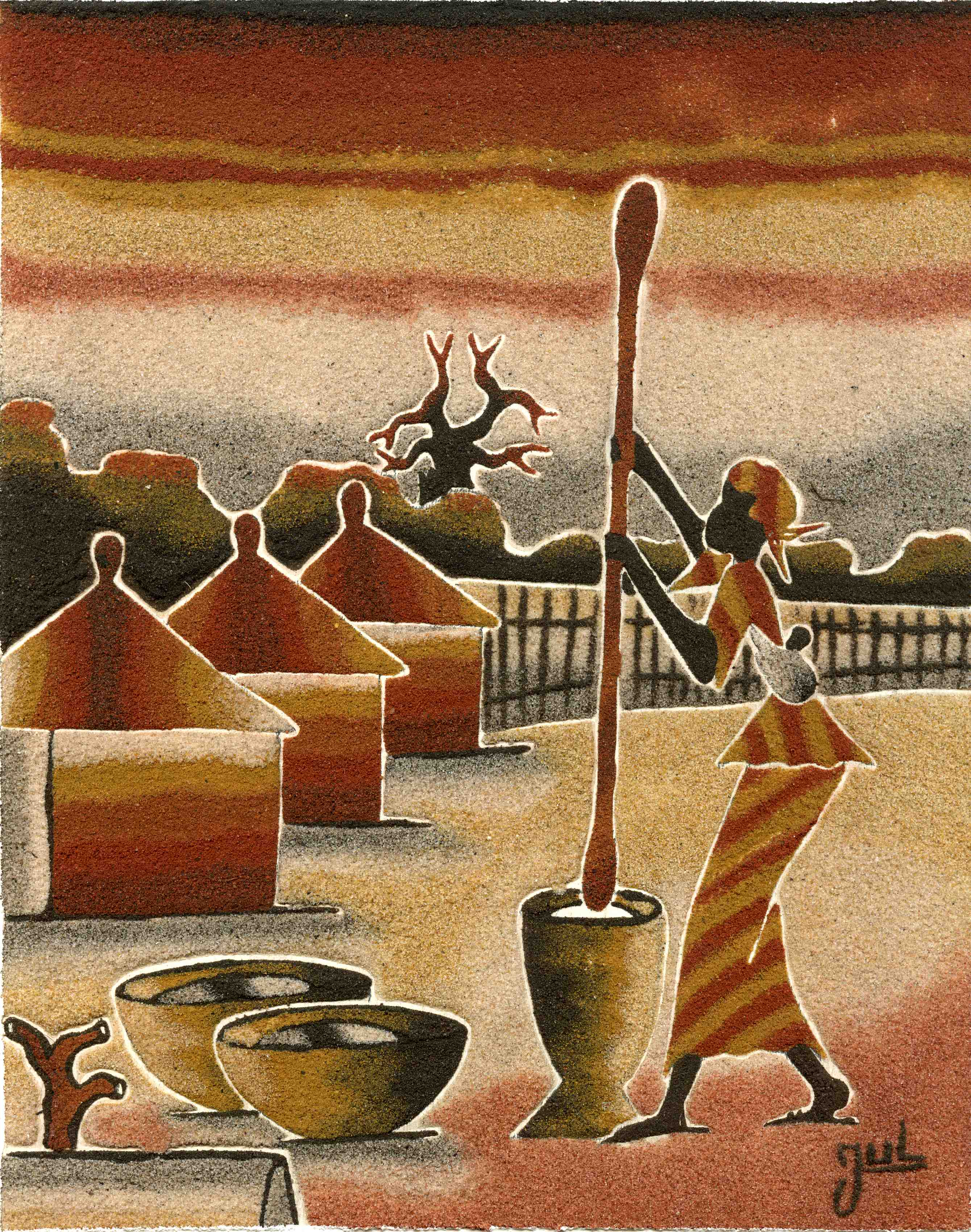 Tableau de sable réalisé par des artistes locaux à Mar Lodj (Sénégal, Delta du Saloum)